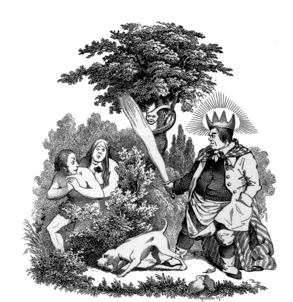 Frontispiz zu Sebastian Sailers Die Schöpfung der ersten Menschen, der Sündenfall und dessen Strafe. Ulm : Stettin'sche Buchhandlung, ohne Jahr (vor 1860)